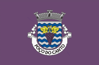 Blason du village de Poço do Canto cérémonies